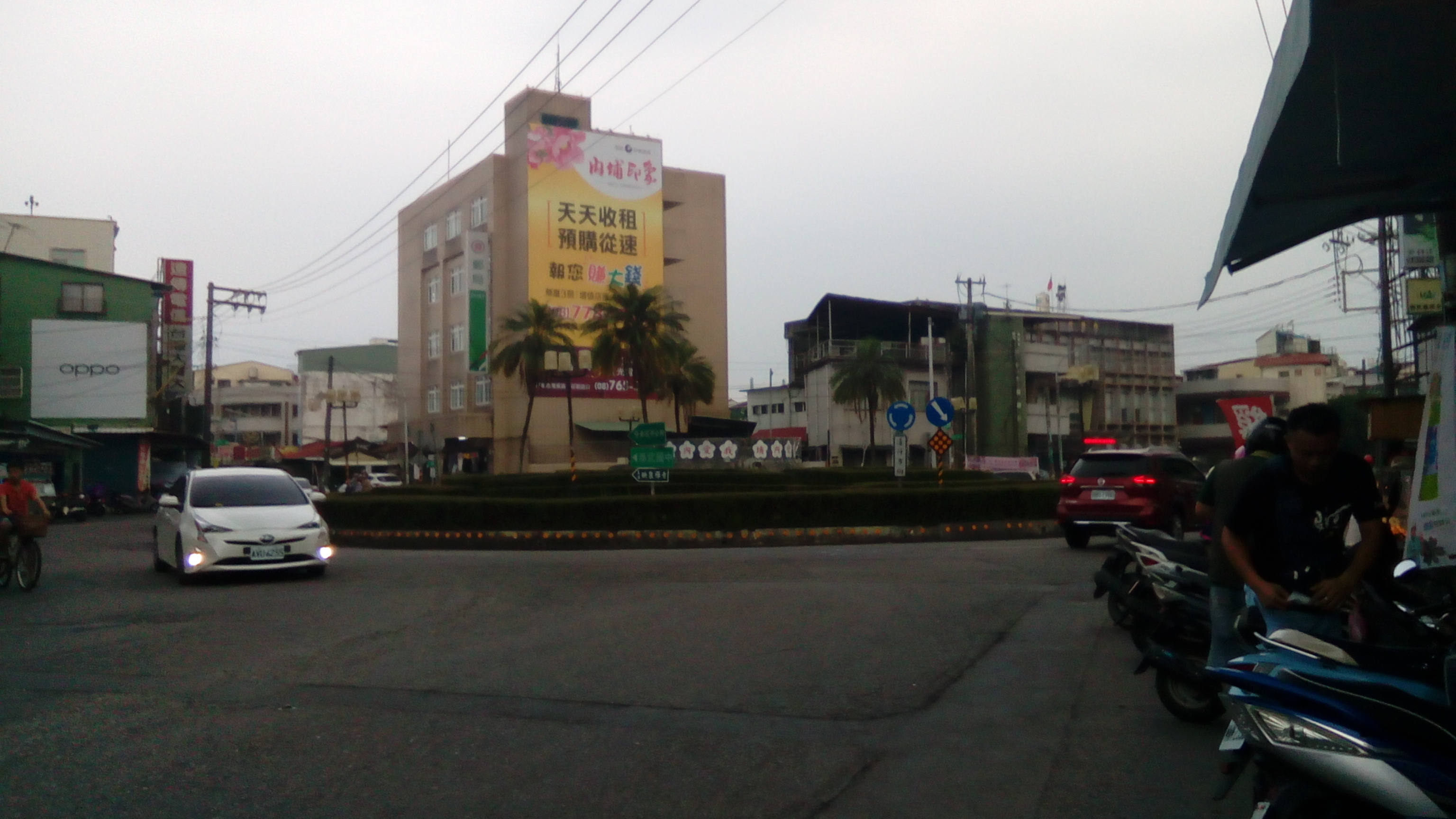 位於187縣道上